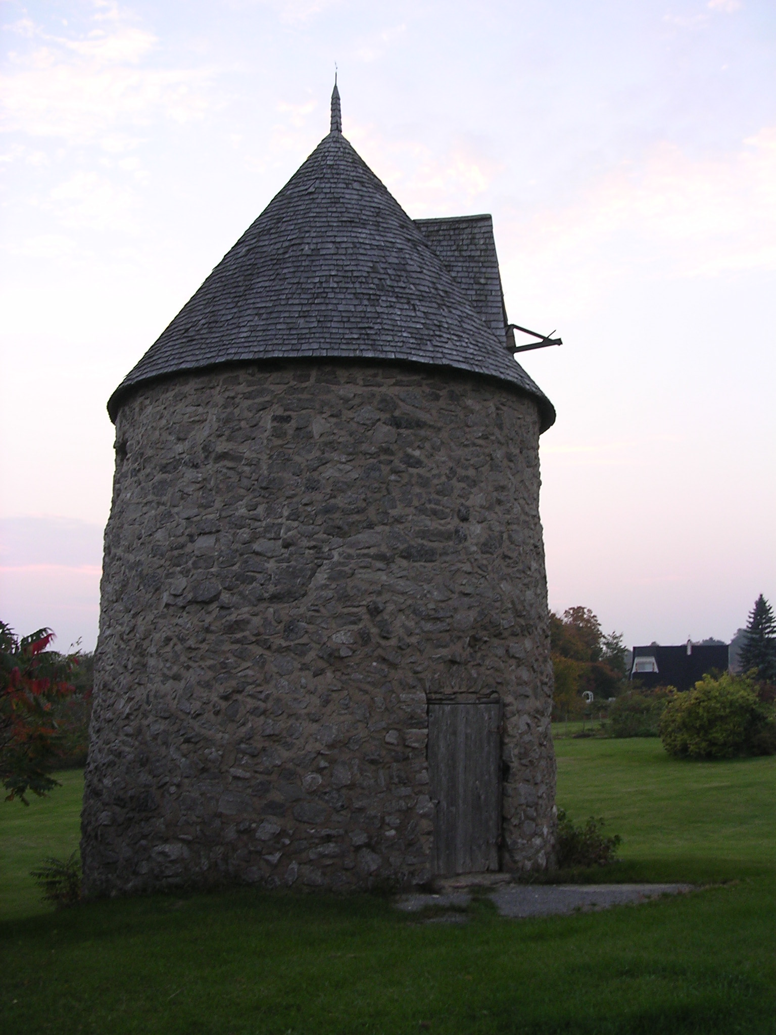 Moulin Voyer à Neuville (Québec). Il s'agit d'une reconstitution d'un moulin à vent inspiré du moulin à vent de l'Île-aux-Coudres. Le nom Voyer est celui de ses constructeurs.